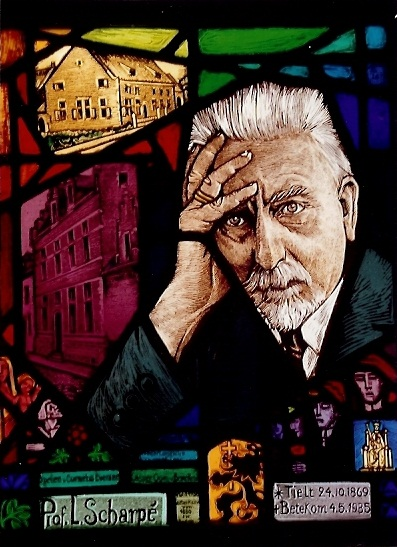 Glasraam Lodewijk Scharpé door Frederik Roderburg 1937